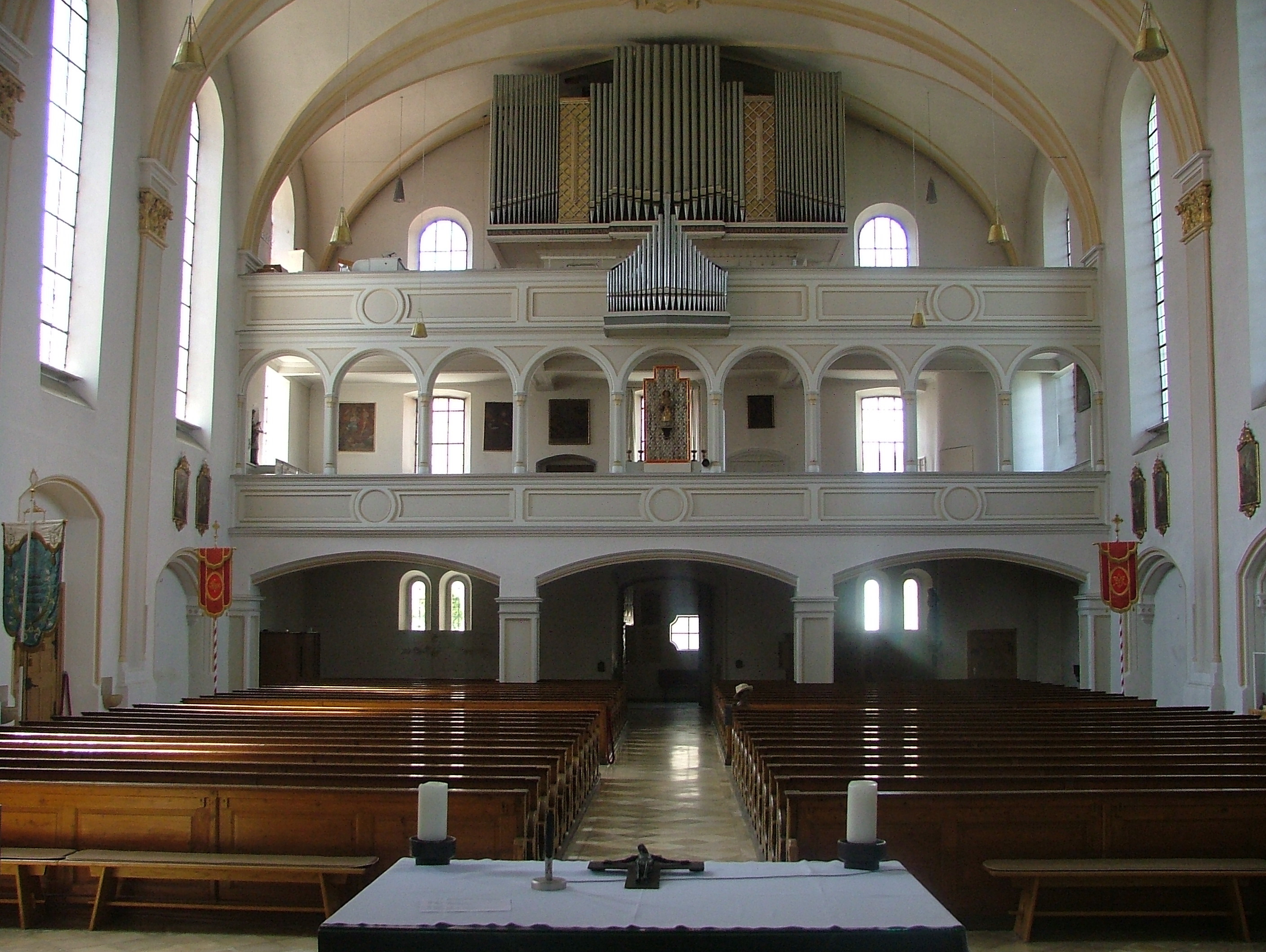 Empore mit 2015 ersetzter Orgel